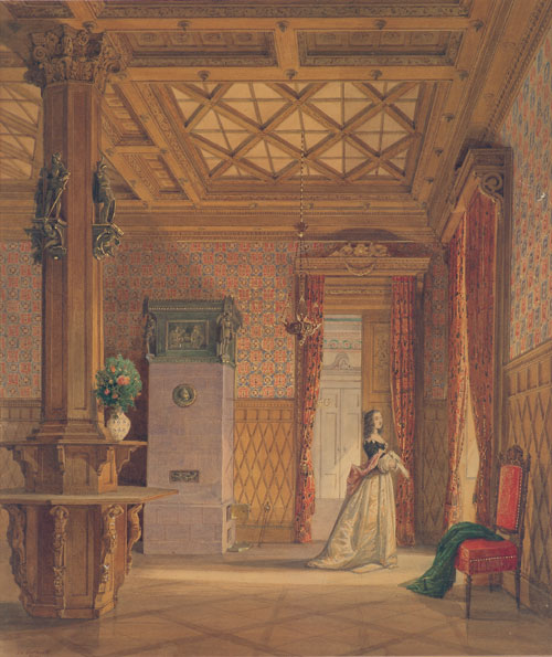 Der Bernhardinen-Saal im Palais des Grafen Schönborn, 1846. Aquarell, 40,5 x 34 cm (womöglich Palais Schönborn-Wiesentheid, Ottostraße 9, München, erbaut von Graf Erwein Hugo Damian von Schönborn-Wiesentheid 1843-1846, nicht erhalten, nach Kriegszerstörung bis 1952 abgetragen)